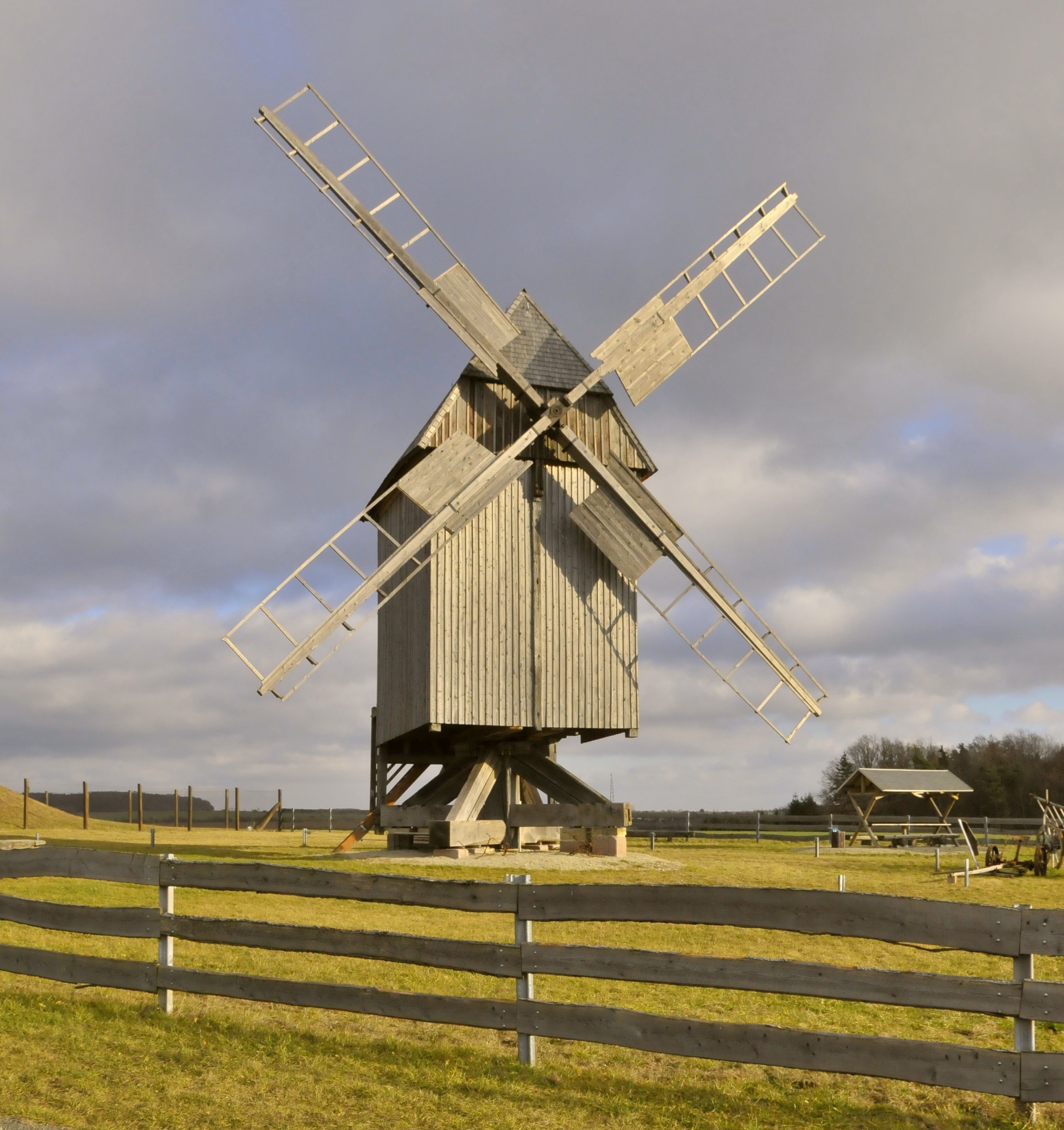 Klettbach, Mühle